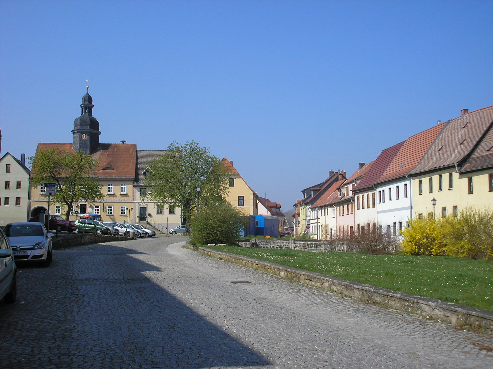 Blick über den Marktplatz mit Rathaus von Dornburg/Saale (Thüringen).